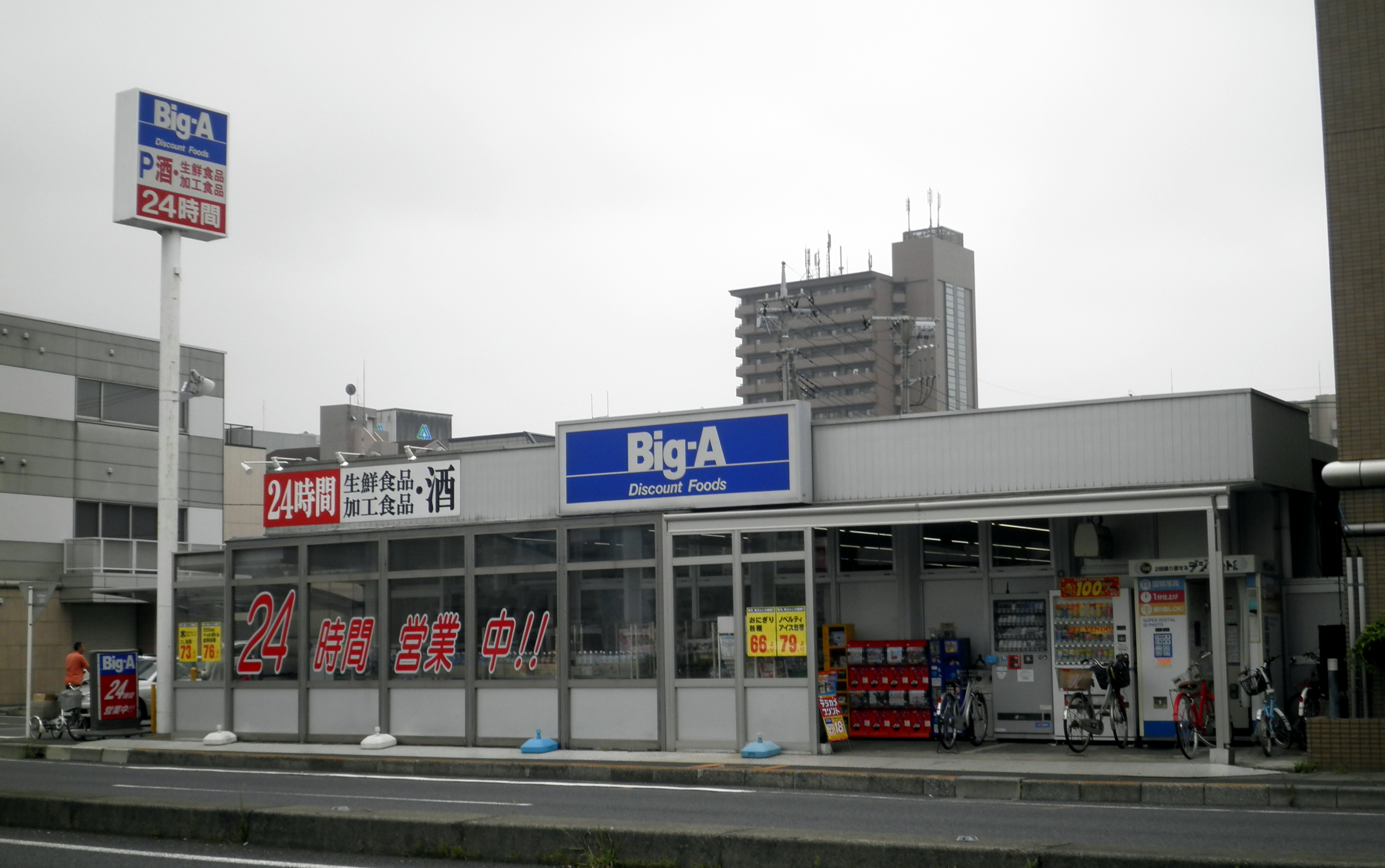 ダイエーグループのディスカウントストア、「ビッグ・エー」宮原店（埼玉県さいたま市北区宮原町）。